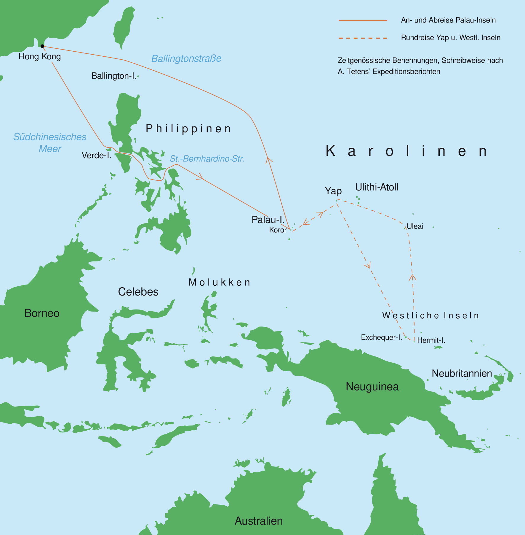 Karte zur zweiten Vesta-Expedition Alfred Tetens’, Okt. 1866–Mrz. 1867 (zeitgenössische Benennungen). Die Namen von Inselgruppen, Atollen, Inseln und Orten sind die im 19. Jahrhundert in Deutschland gebräuchlichen. Die Schreibweise orientiert sich an Tetens' Expeditionsberichten. PNG-Version zur Einbindung in Artikel.